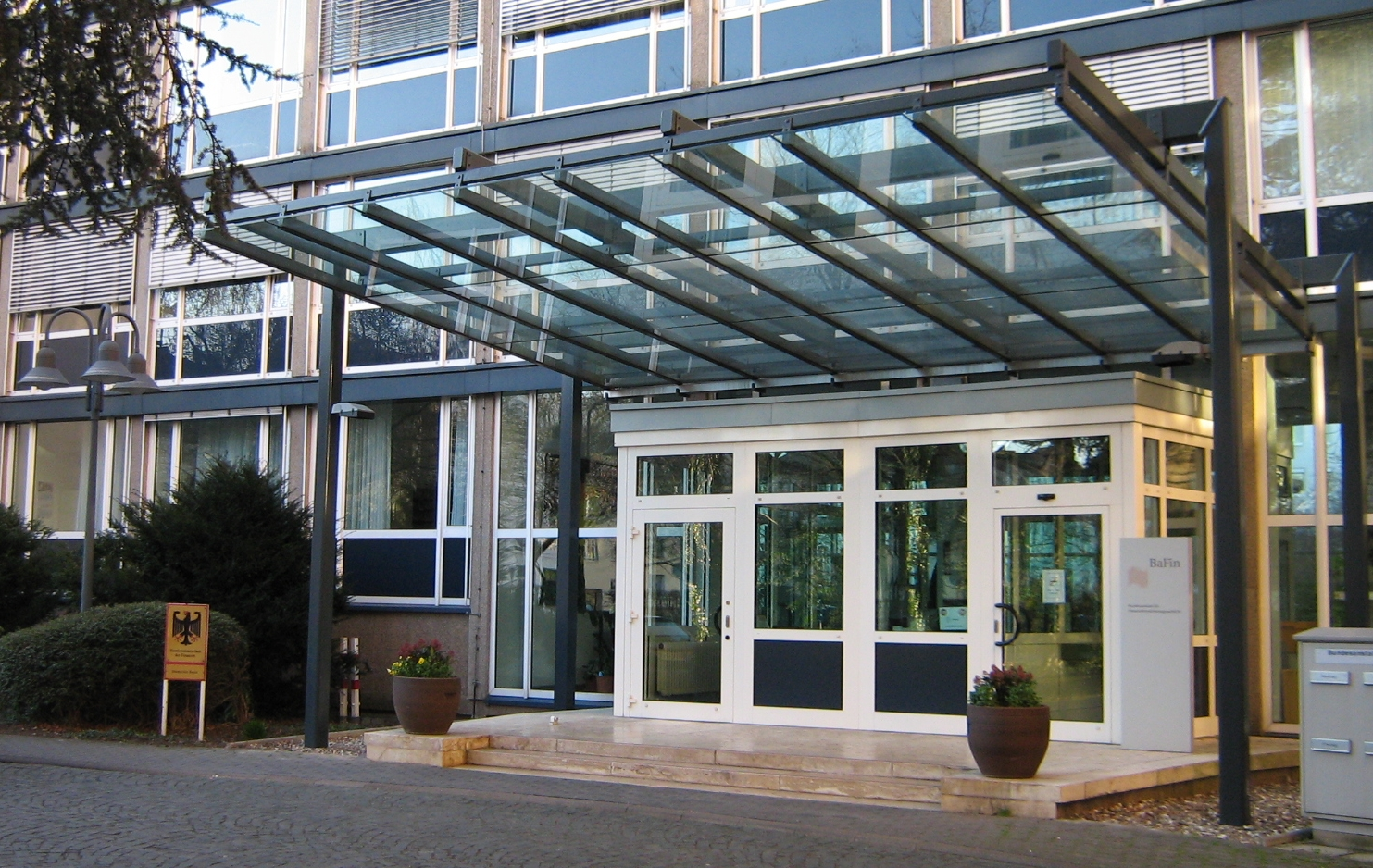 Bundesministerium der Finanzen und Bundesanstalt für Finanzdienstleistungsaufsicht (BaFin); Eingang Dienstsitz Bonn